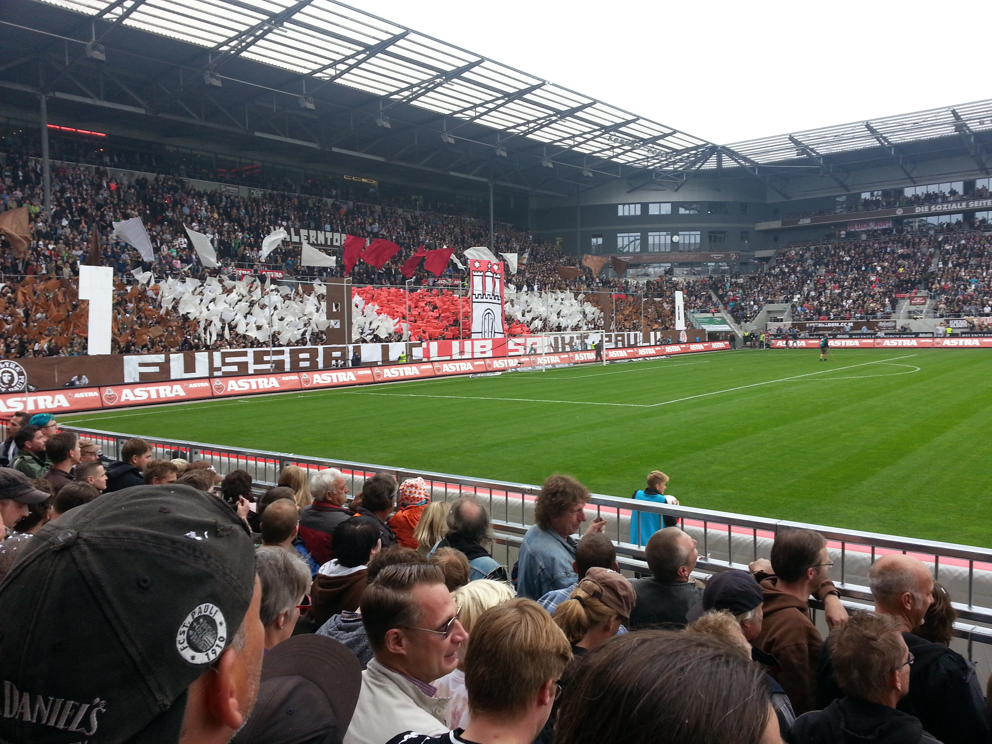 Millerntor-Stadion, 2. Fußball-Bundesliga 7. Spieltag, FC St. Pauli-FSV Frankfurt 2:1 Einlaufchoreographie, Südtribüne St. Pauli, Hamburg, Deutschland